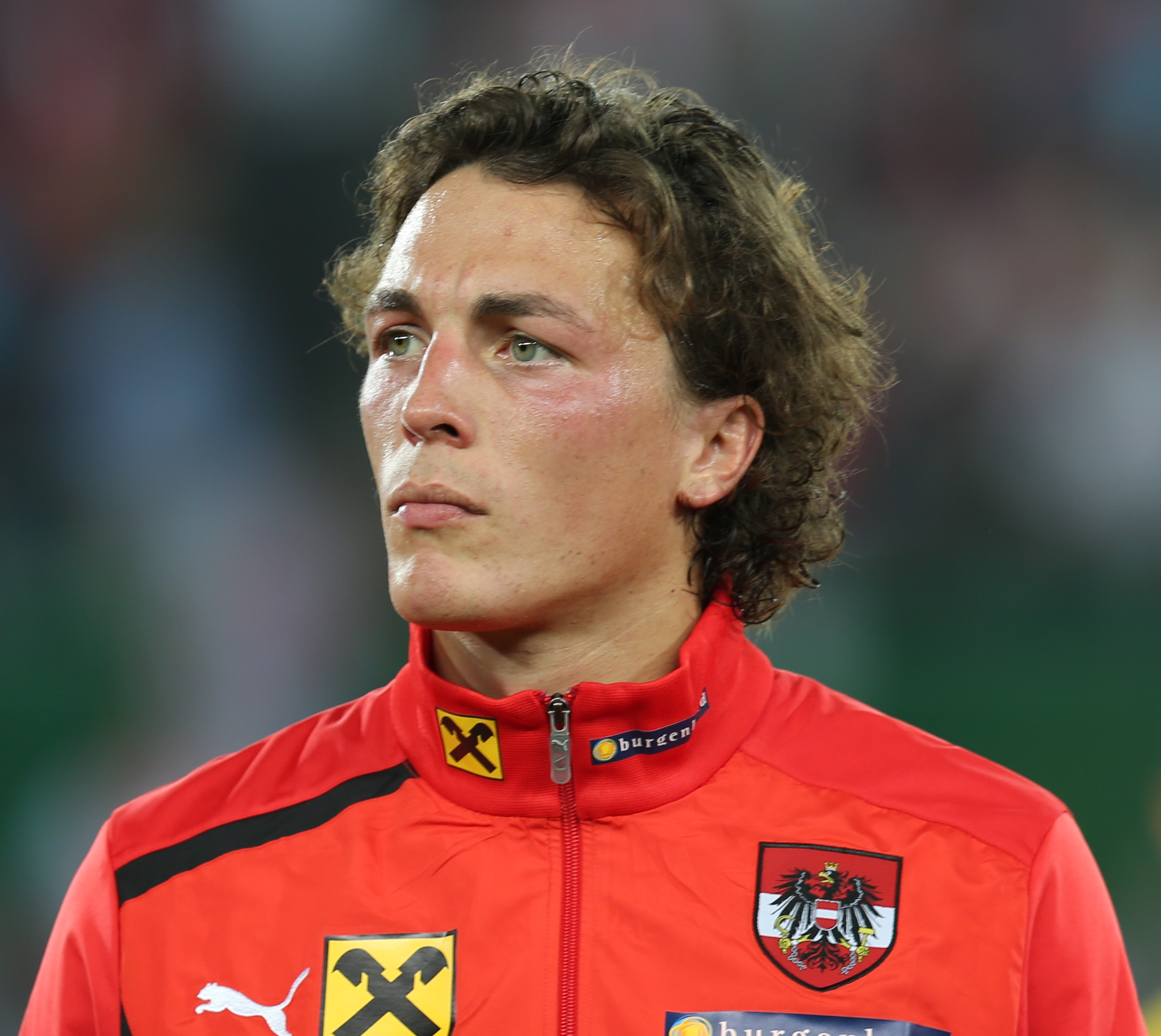 Fußball-Weltmeisterschaft 2014/Qualifikation (UEFA), Gruppe C, 11. September 2012, Österreich gegen Deutschland im Wiener Ernst-Happel-Stadion. The making of this work was supported by Wikimedia Austria. For other files made with the support of Wikimedia Austria, please see the category Supported by Wikimedia Österreich.